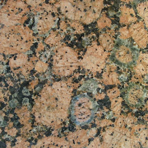 Rabakivi